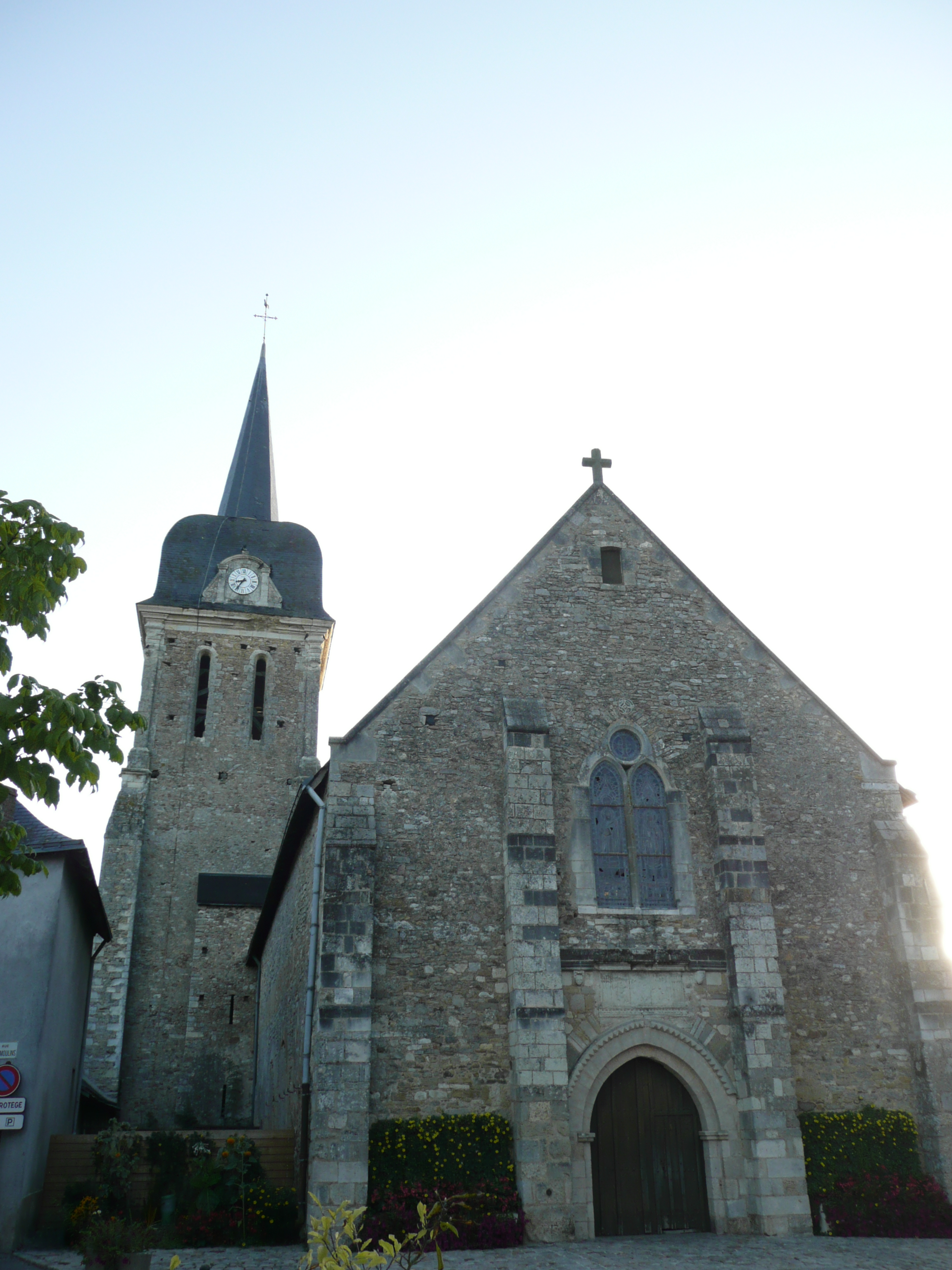 Eglise de Brissarthe .